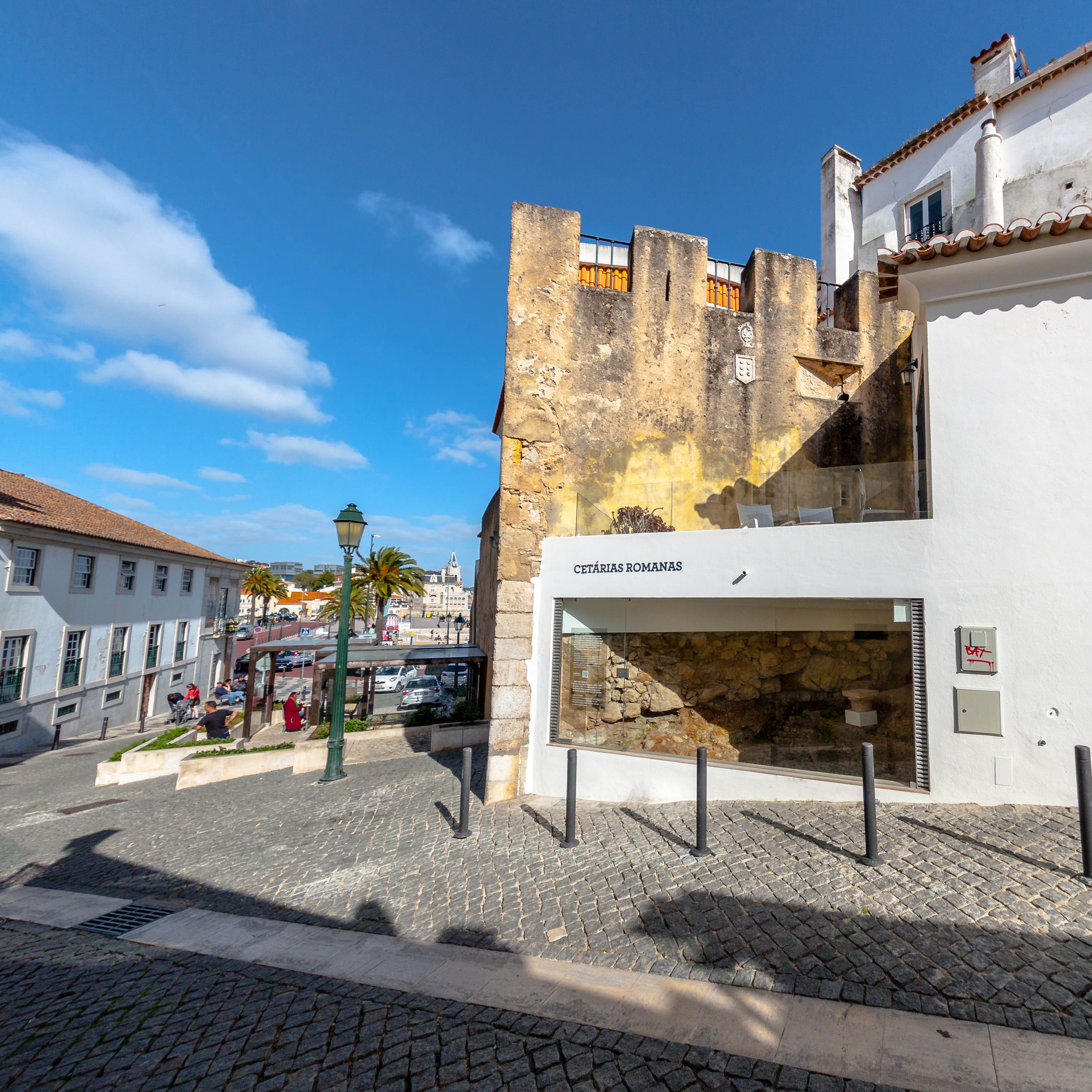 Muralha e cetárias.